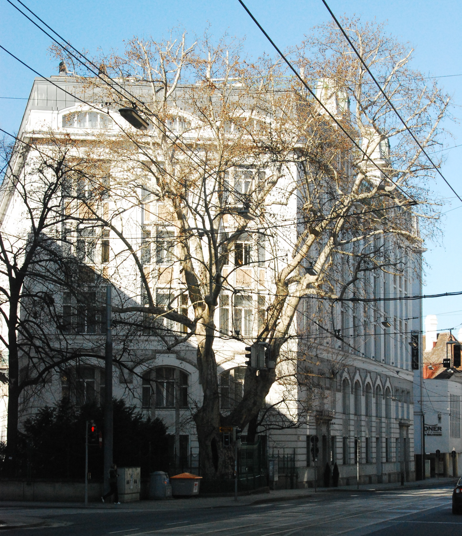 Naturdenkmal Mozart-Platane am Rennweg 14 im 3. Wiener Gemeindebezirk This media shows the natural monument in Vienna with the ID 9.